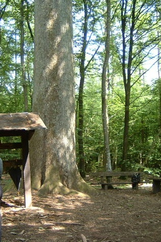 Roth an der Our, 450jährige Muttereiche im Kammerwald, 32 m hoch, 5,20m Umfang